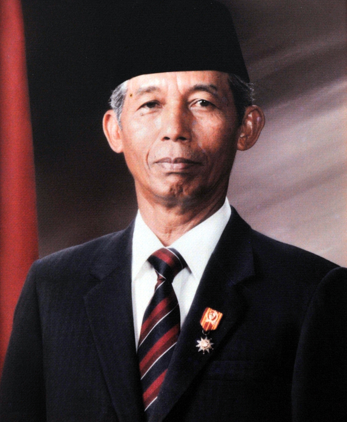 Foto Resmi Sudharmono